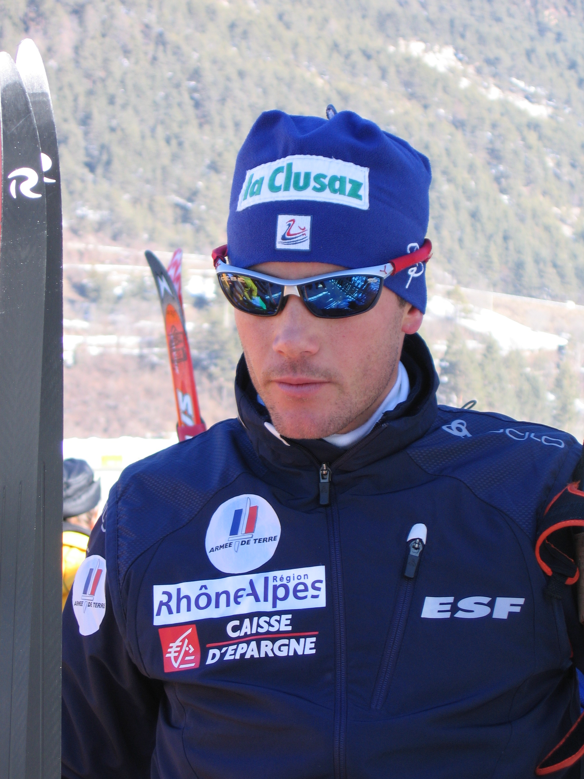 French skier Vincent Vittoz.